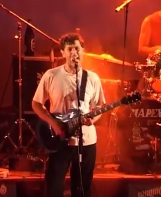 Cesar Dominici